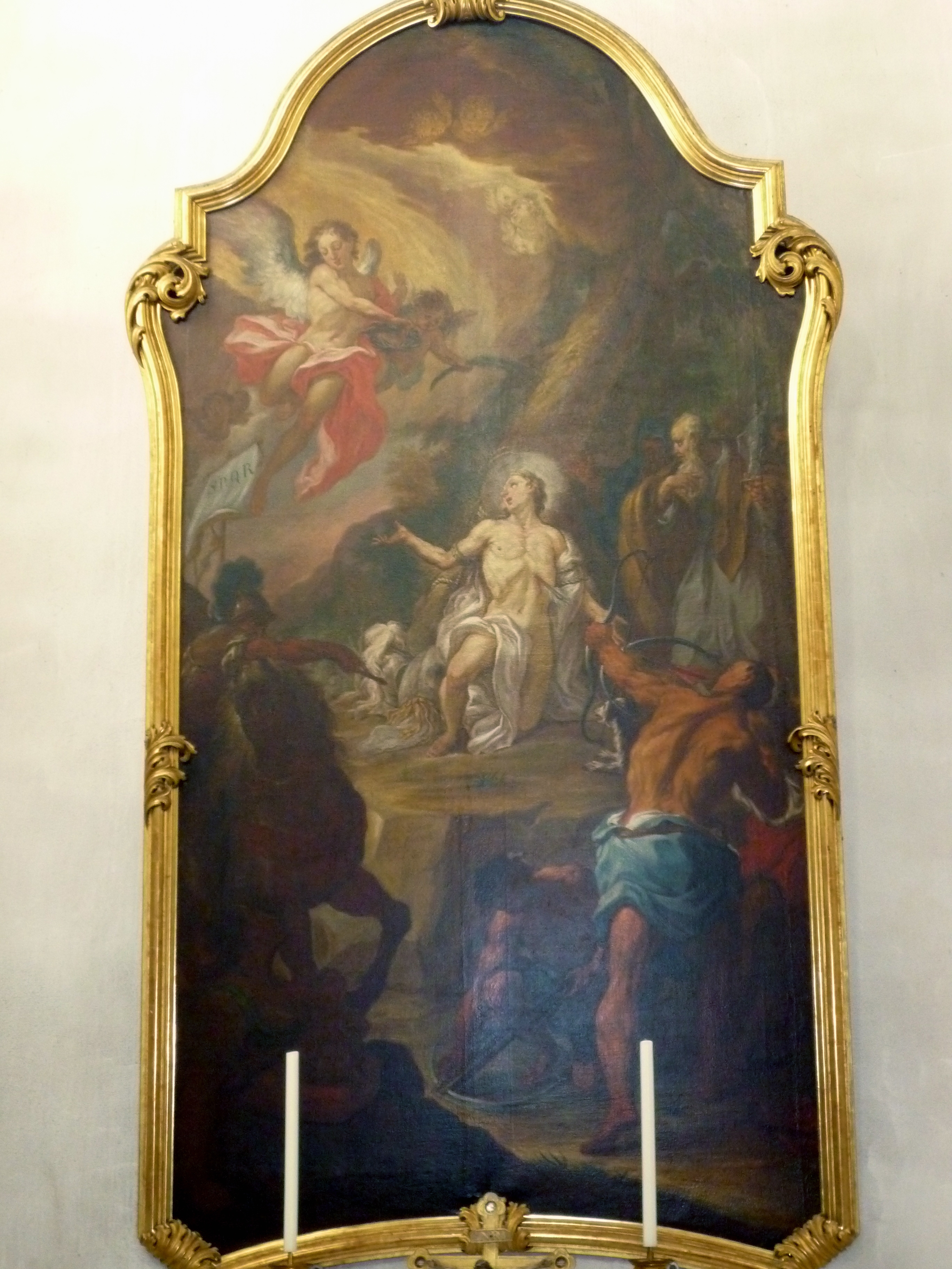 Sebastianssaltar in der Klosterkirche Metten, Altarbild "Martyrium des hl. Sebastian" von Martin Speer (Mitte 18. Jh.)